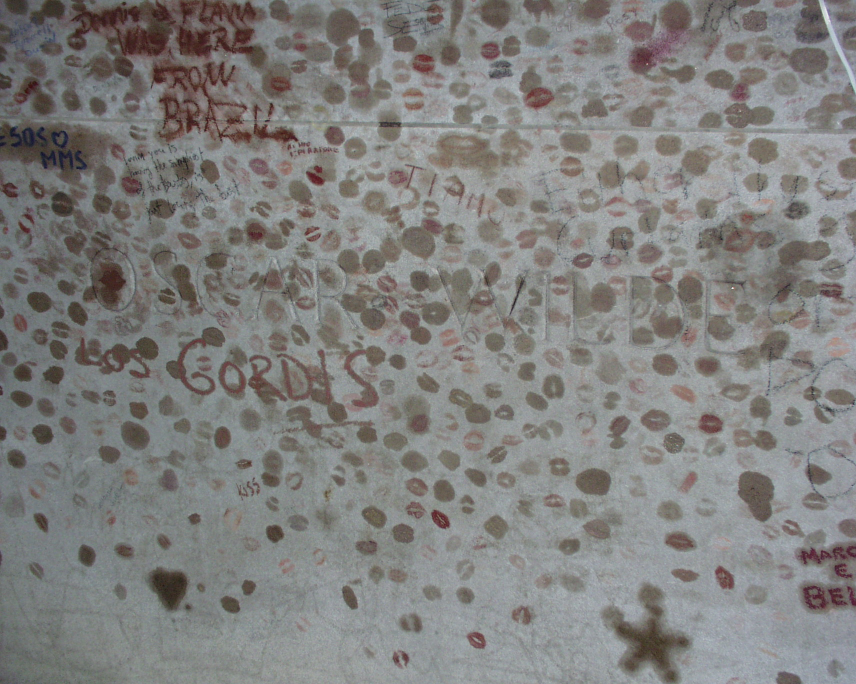 Cimetière du Père-Lachaise in Paris -- Detail of Oscar Wilde's grave, sculpted by Jacob Epstein.